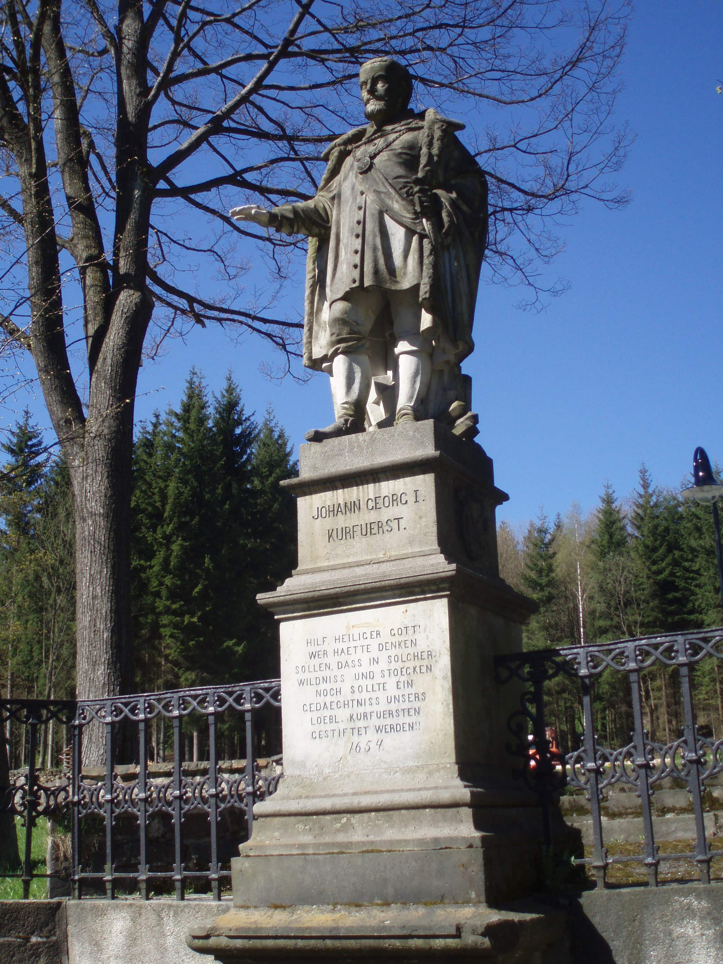 Denkmal für Johann Georg I. in Johanngeorgenstadt